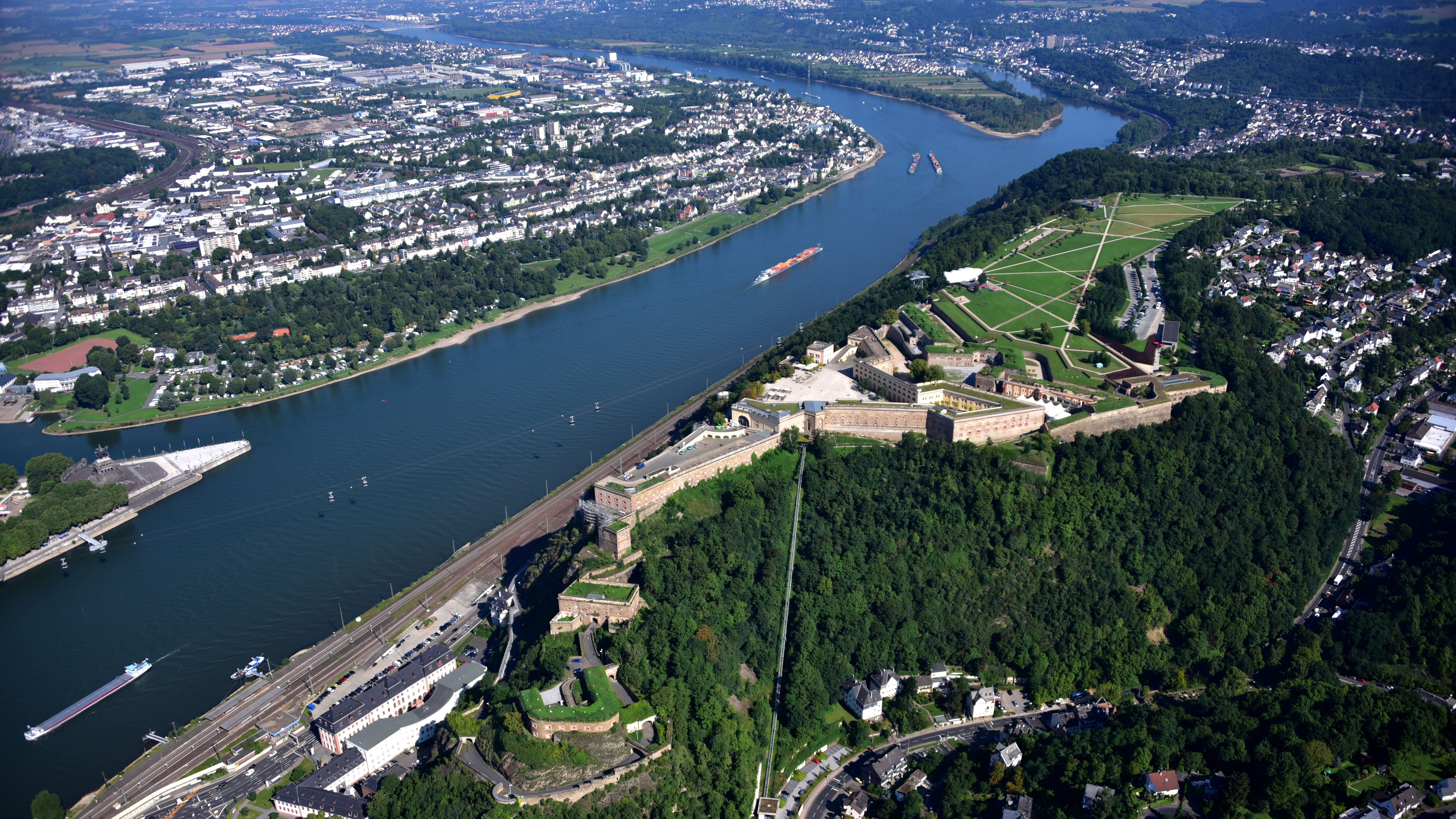 Festung Ehrenbreitstein, Luftaufnahme (2017)